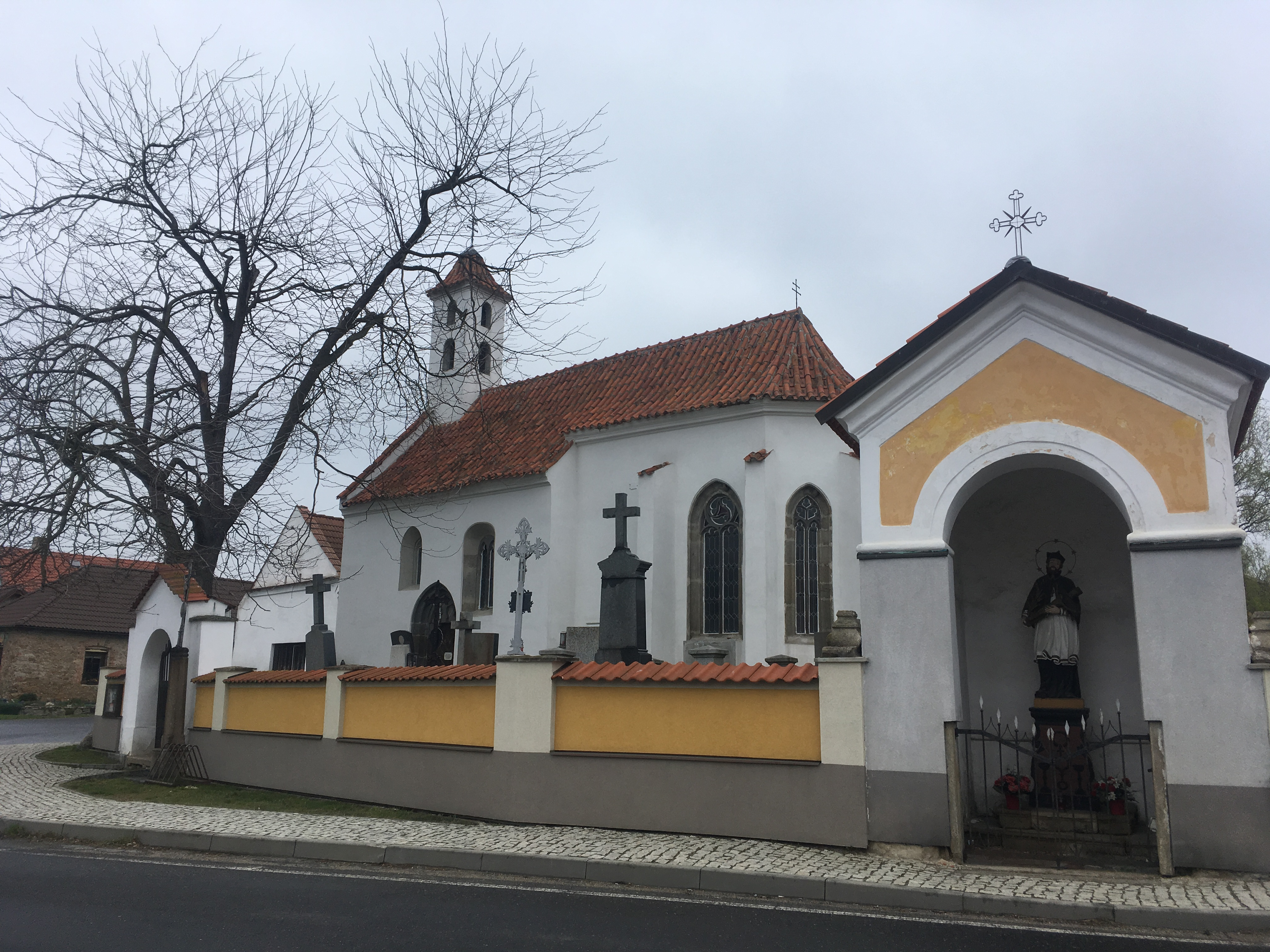 kostel